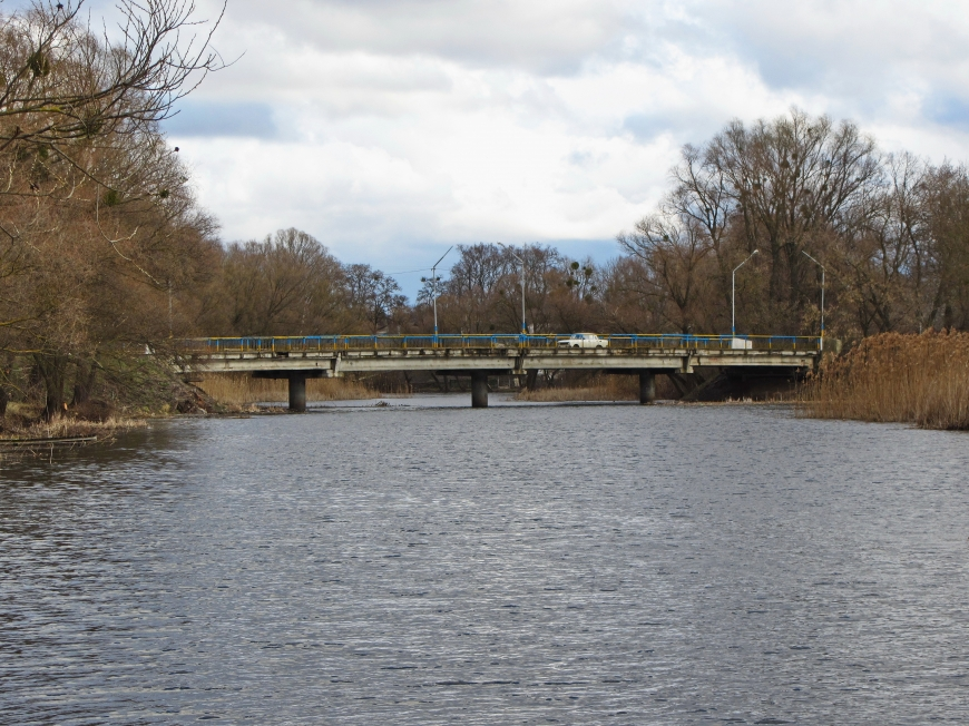 Річка Лохвиця та Івахницький міст ( у м. Лохвиця). Фото - квітень 2015 р.